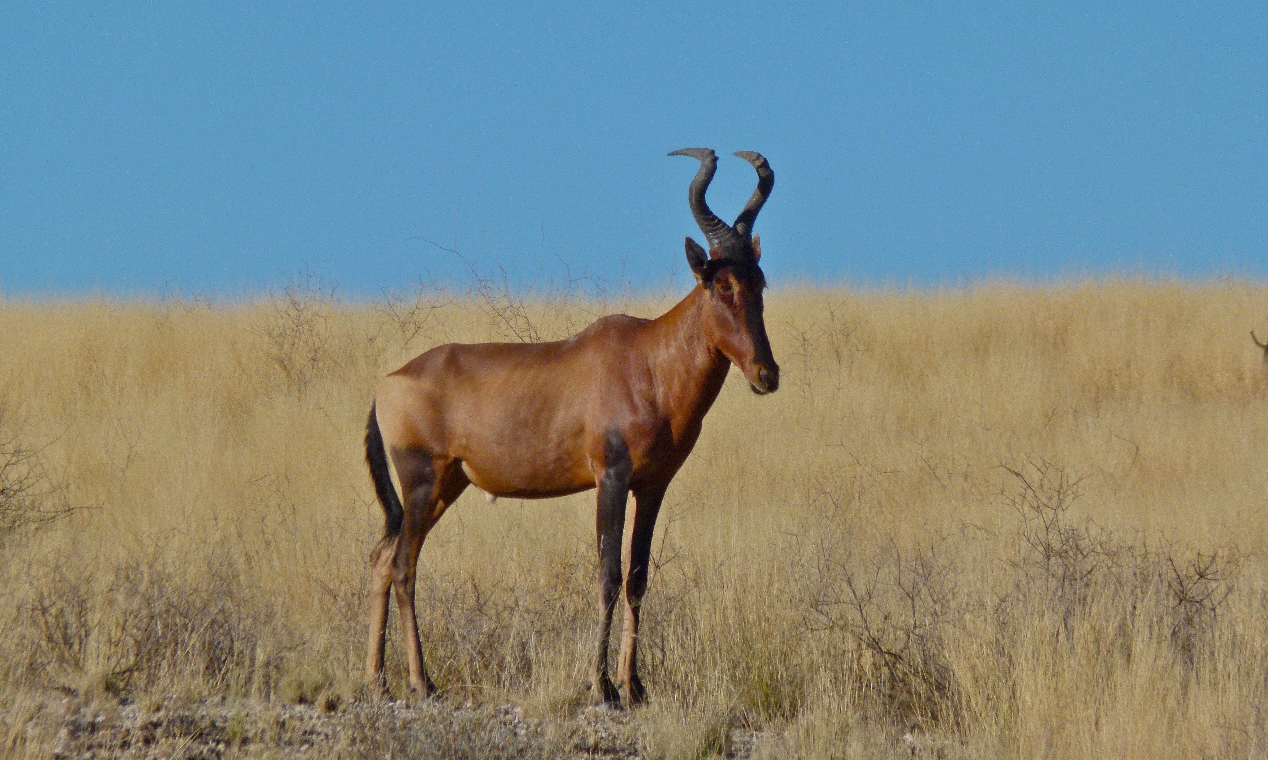 Nossob Riverbed, Kgalagadi Transfrontier Park, SOUTH AFRICA